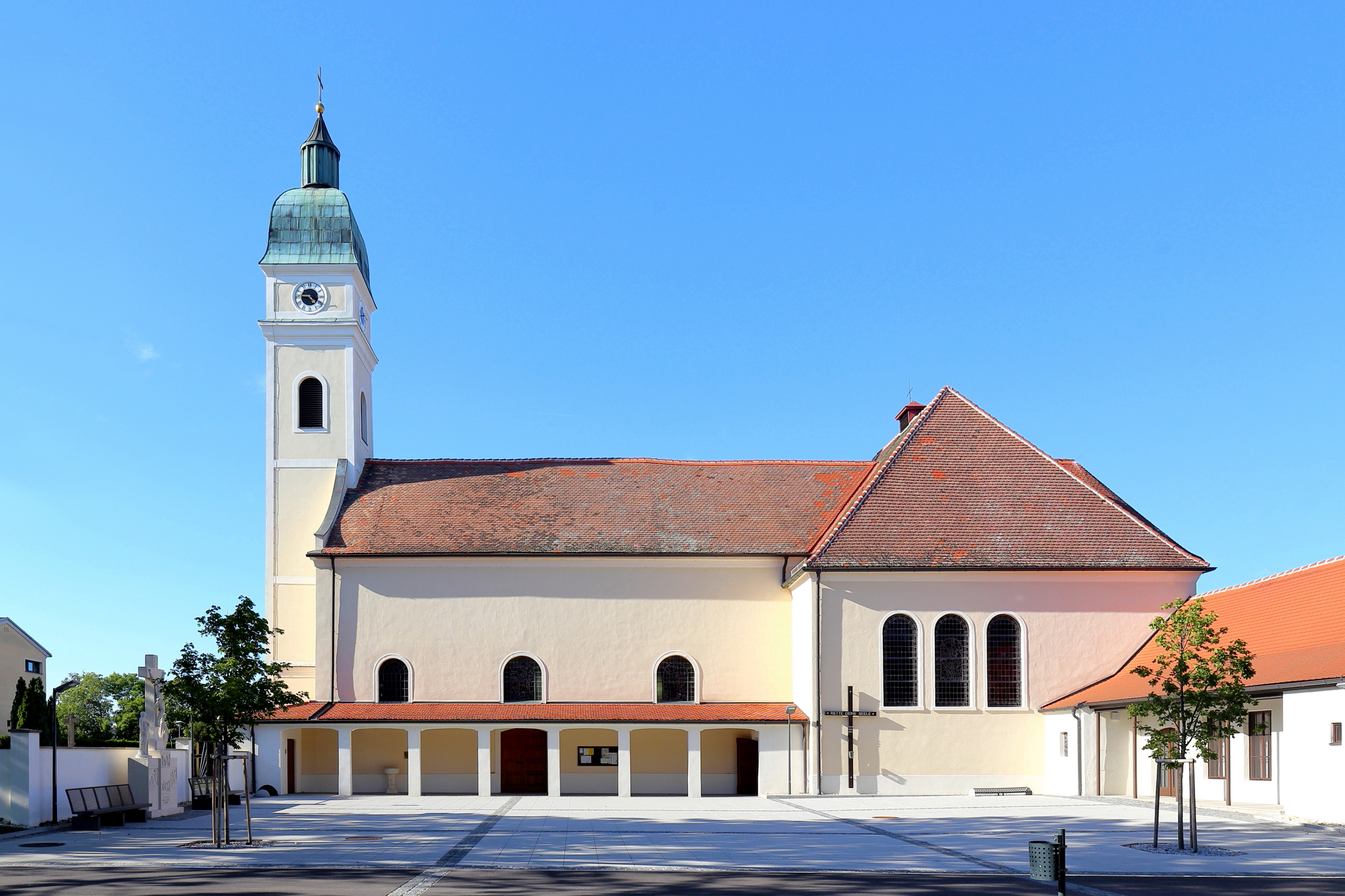 Südansicht der röm.-kath. Pfarrkirche Zur Kreuzerhöhung der burgenländischen Gemeinde Pamhagen.Die Kirche wurde von 1745 bis 1754 errichtet. Unter Pfarrer Mathias Sandhofer erfolgte Mitte der 1950er Jahre eine Erweiterung und ein Umbau der Kirche.